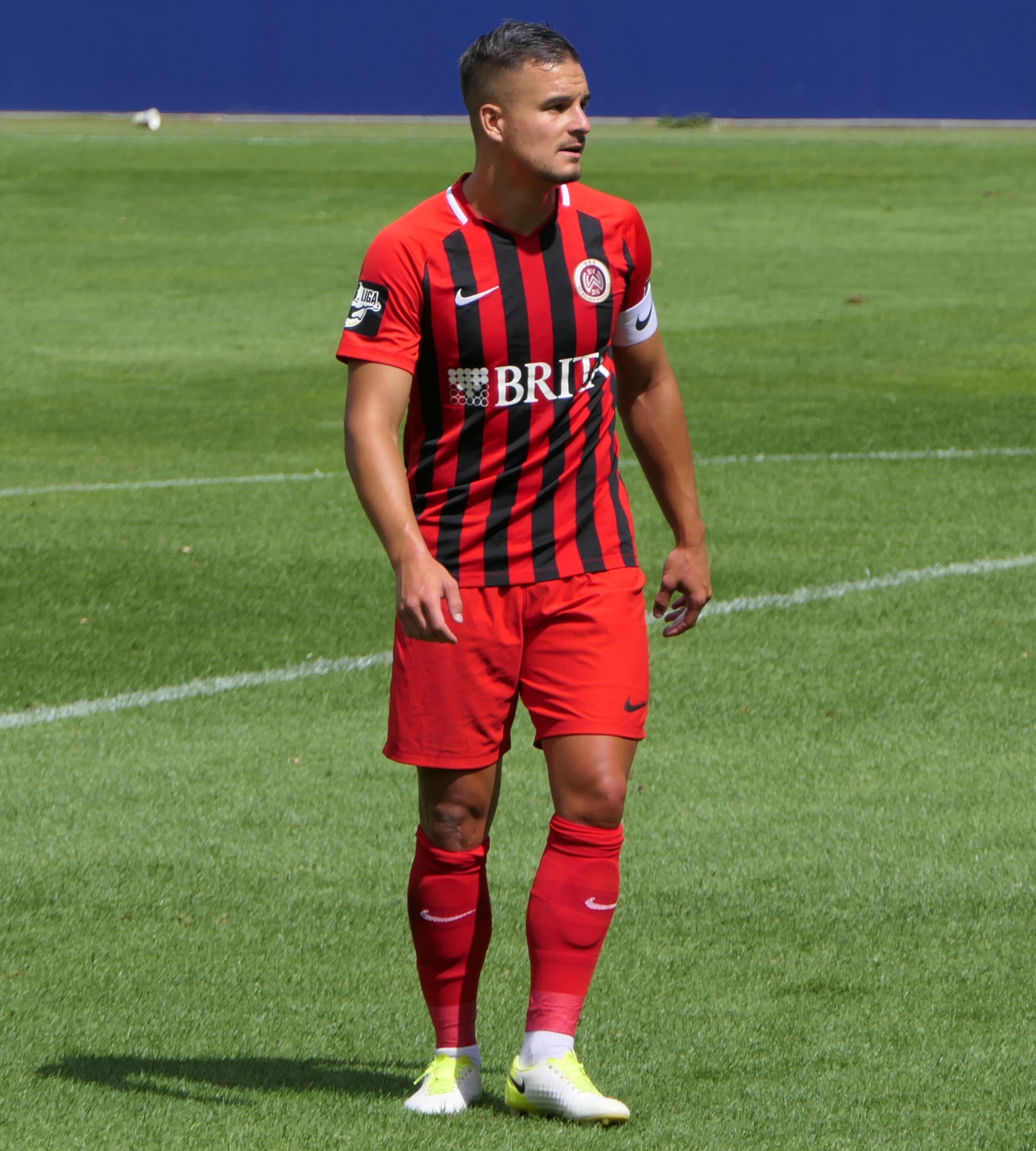 Der Fussballprofi Sebastian Mrowca im Trikot von Wehen Wiesbaden beim Heimspiel gegen Eintracht Braunschweig am 11.08.2018.